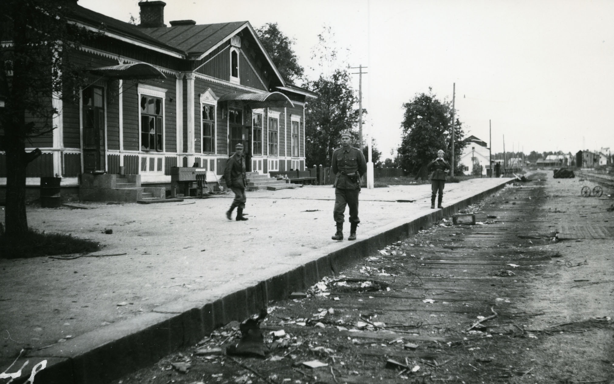 Лесогорский, 20.8.1941